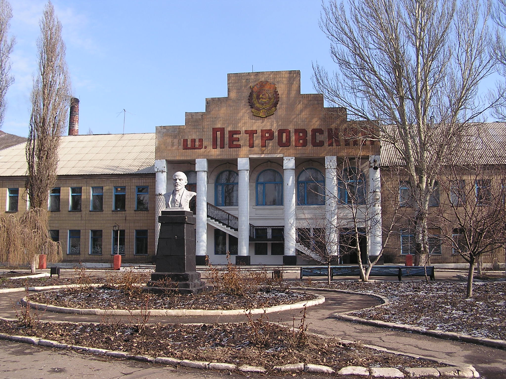 Донецк. Шахта Петровская.